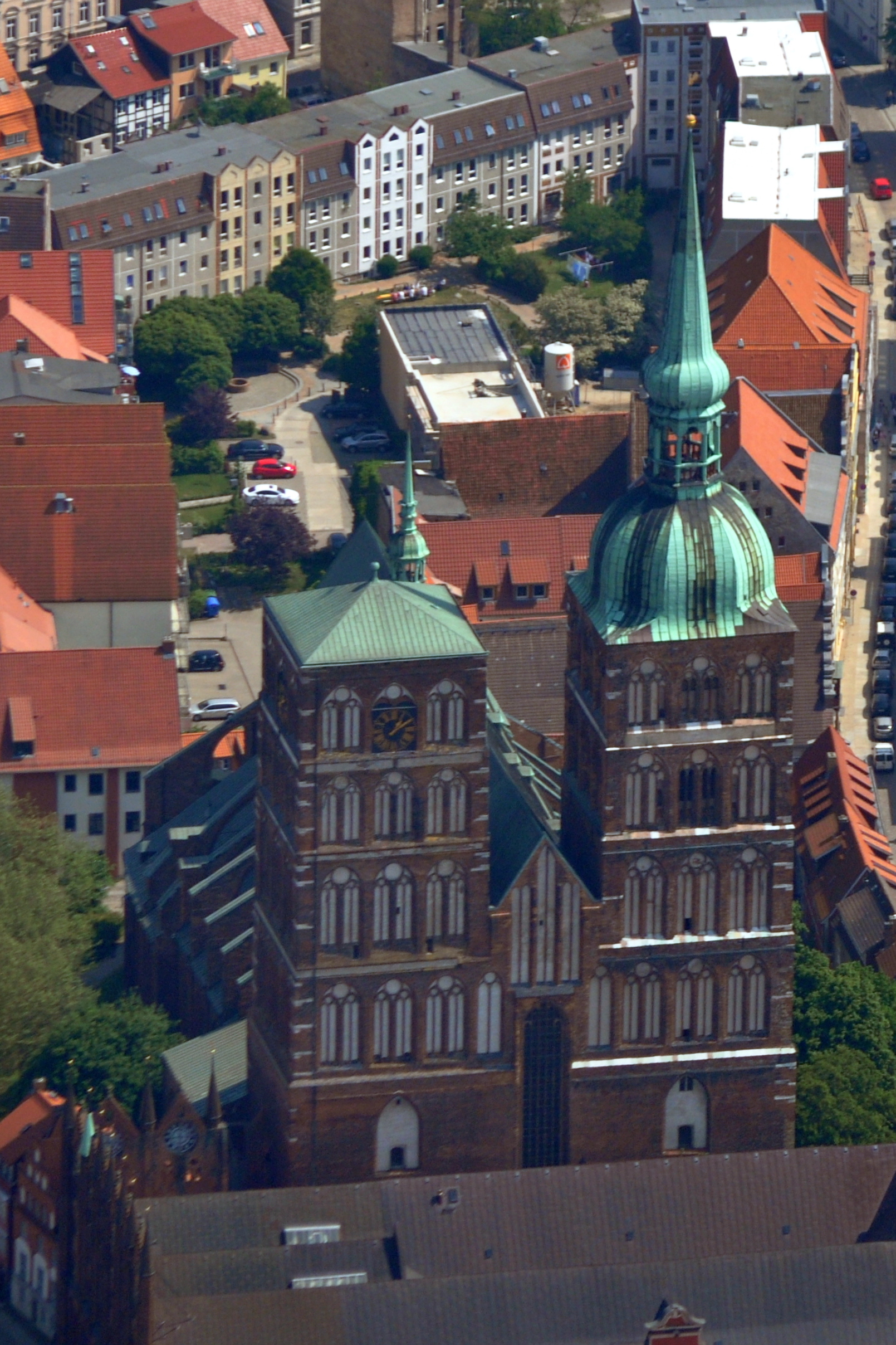 Die Bilder wurden von mir während eines einstündigen Rundflugs ab Flugplatz Güttin am 21. Mai 2011 aufgenommen. Die Bildbeschreibung steht im Dateinamen. Aufgenommen mit einer Nikon D5000 durch das Seitenfenster des Flugzeugs.